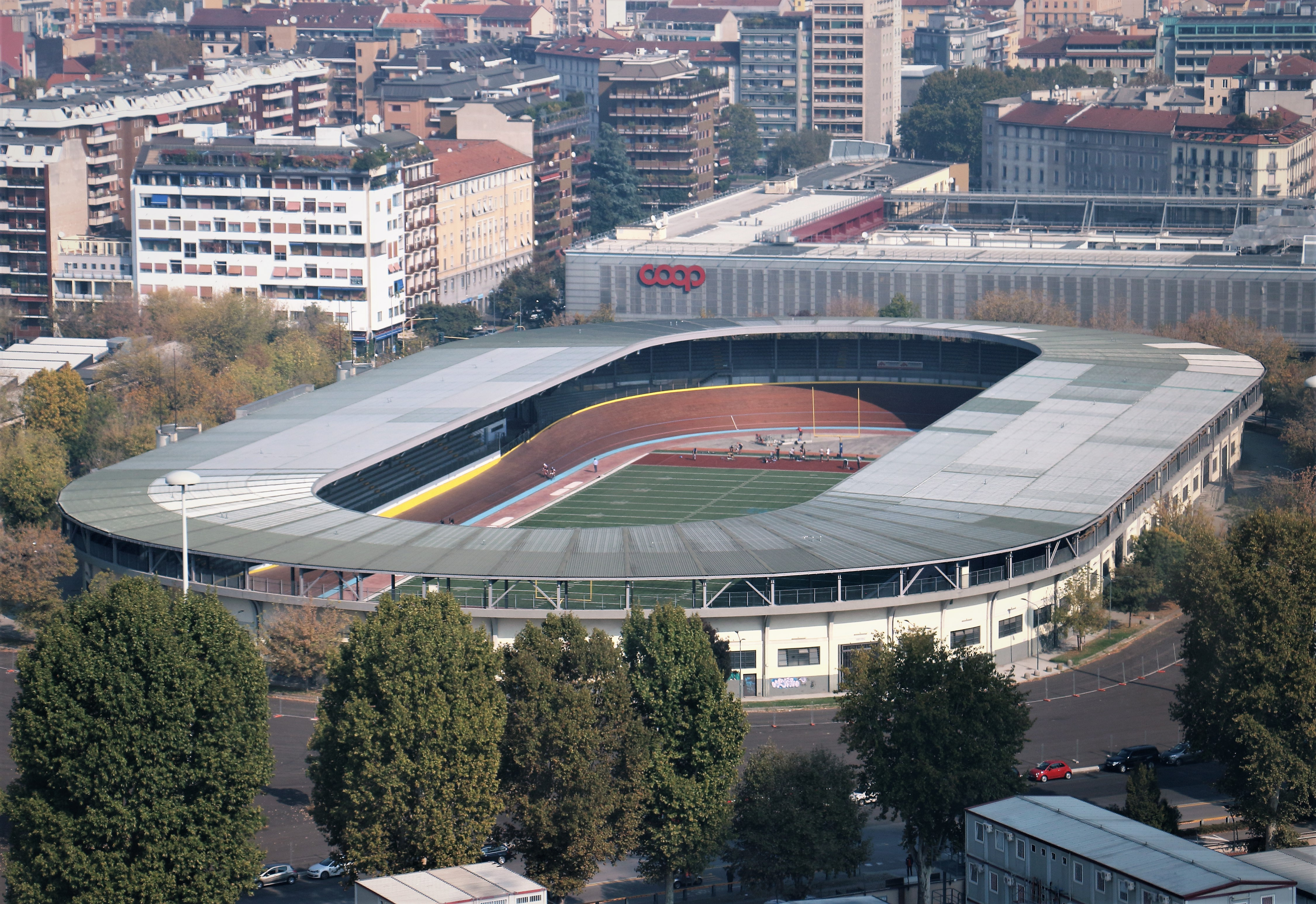 Velodromo Vigorelli veduta panoramica prima del restauro del manto per il football americano This is a photo of a monument which is part of cultural heritage of Italy.